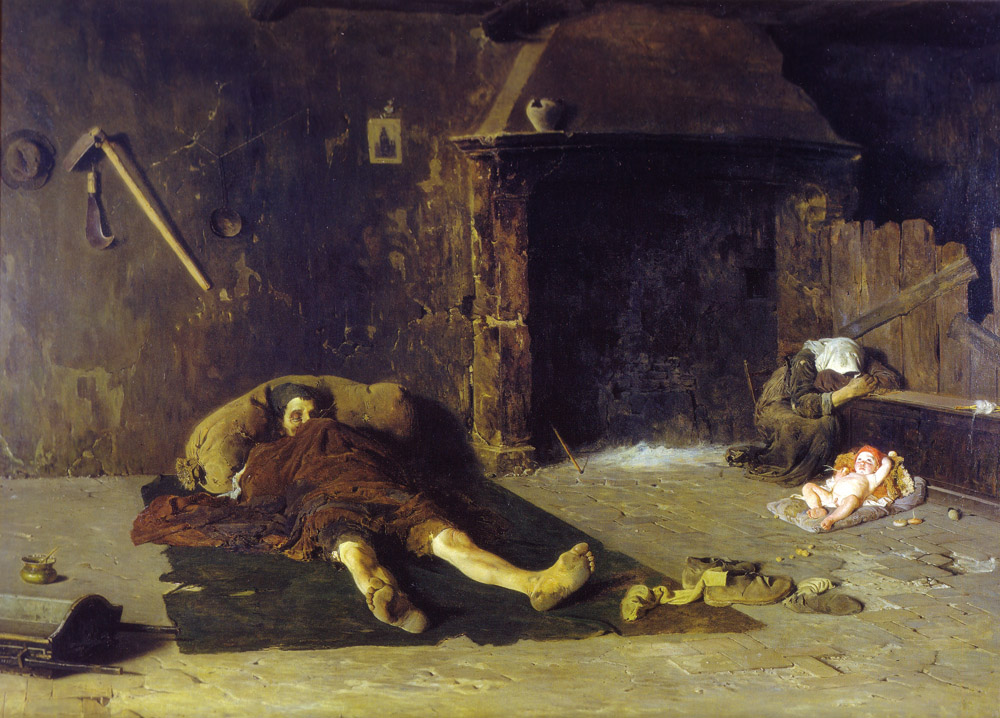 L'erede, olio su tela, riedizione tarda CALASCIO, COLLEZIONI D'ARTE DEL MUNICIPIO 132 × 176 cm.